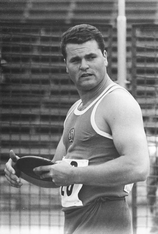 Hartmut Losch Zentralbild Wendorf 19.11.1967 Sotsch: Leichtathletik-Meisterschaften der befreundeten sozialistischen Armeen Hartmut Losch gewann Diskuswerfen. Am ersten Tag der Leichtathletik-Meisterschaften der befreundeten sozialistischen Armeen in Sotschi (am 18.11.1967) gewann Hartmut Losch (DDR) das Diskuswerfen mit 58,16 m. (Archivfoto) Abgebildete Personen: Losch, Hartmut: Diskuswerfer, DDR